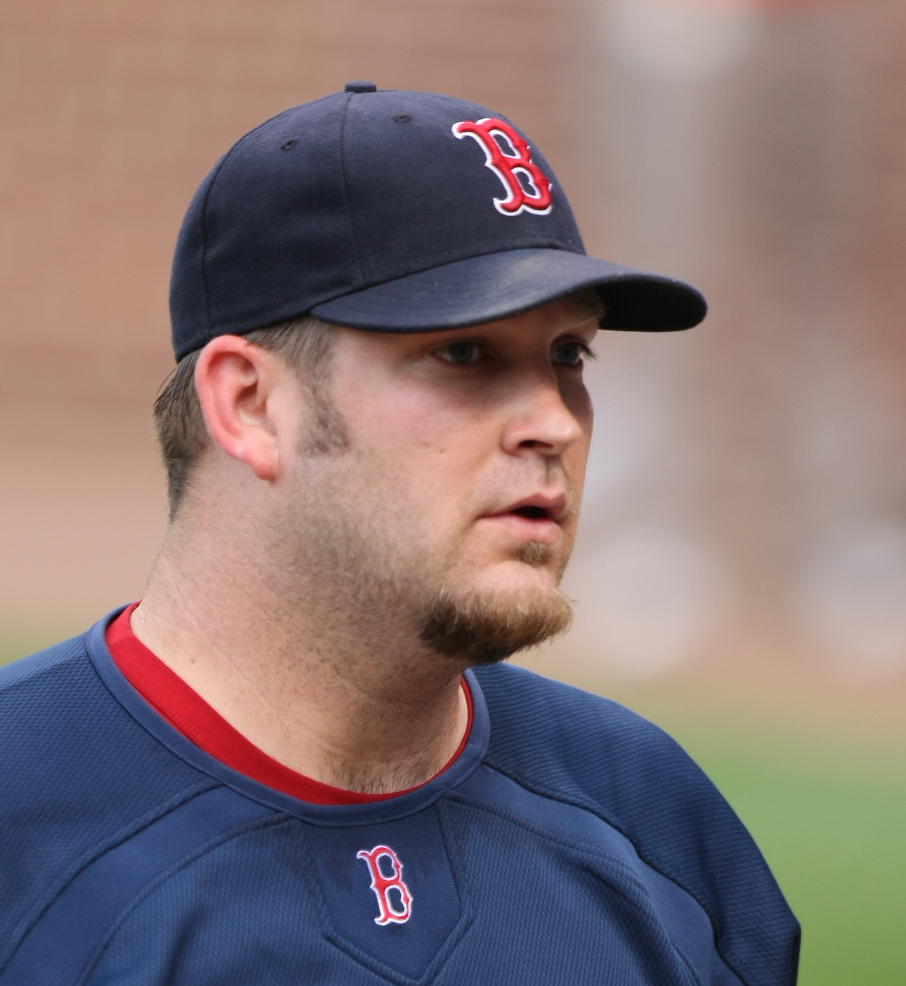 Brad Penny